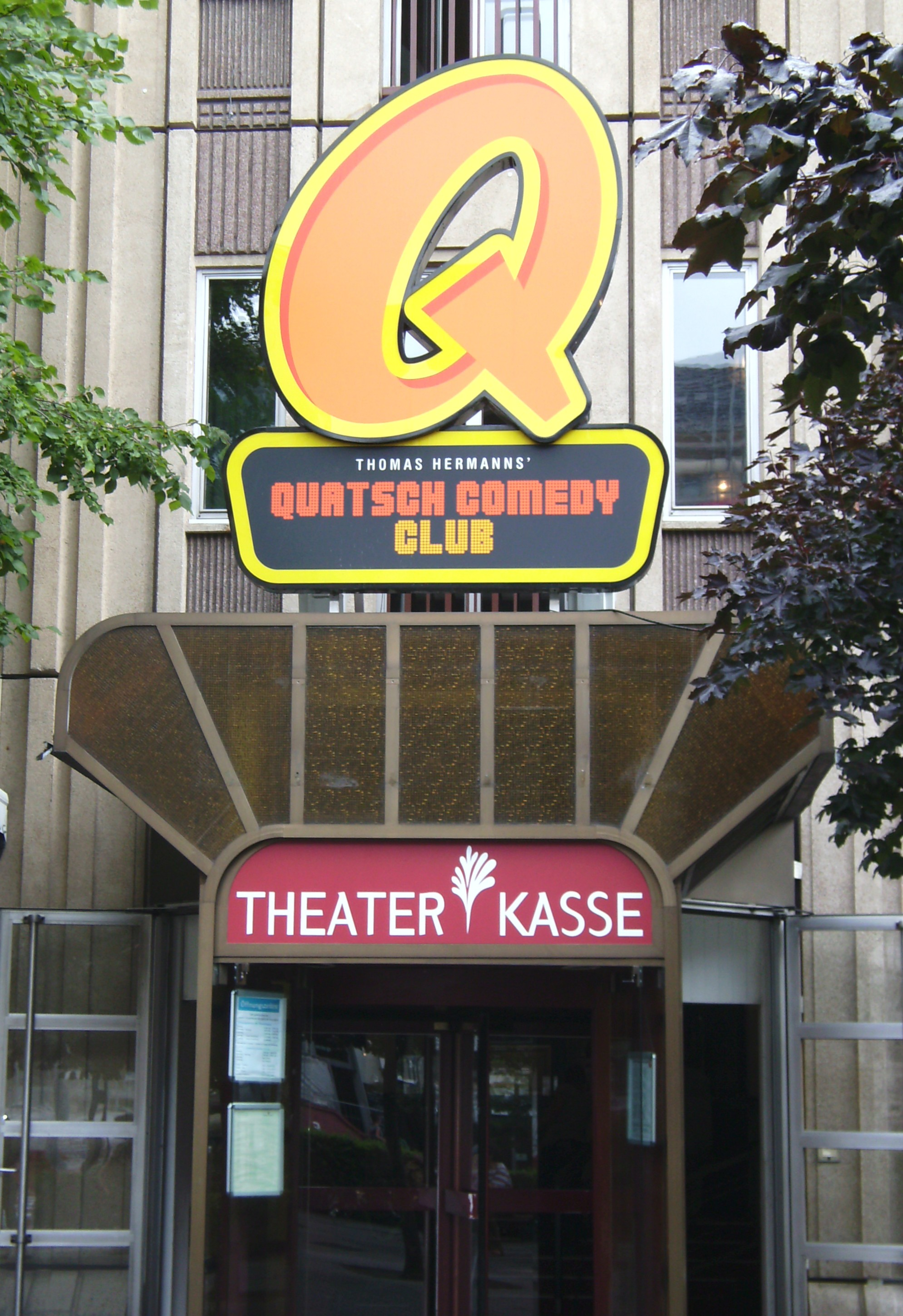 Der Quatsch Comedy Club in Berlin (Friedrichstadtpalast)